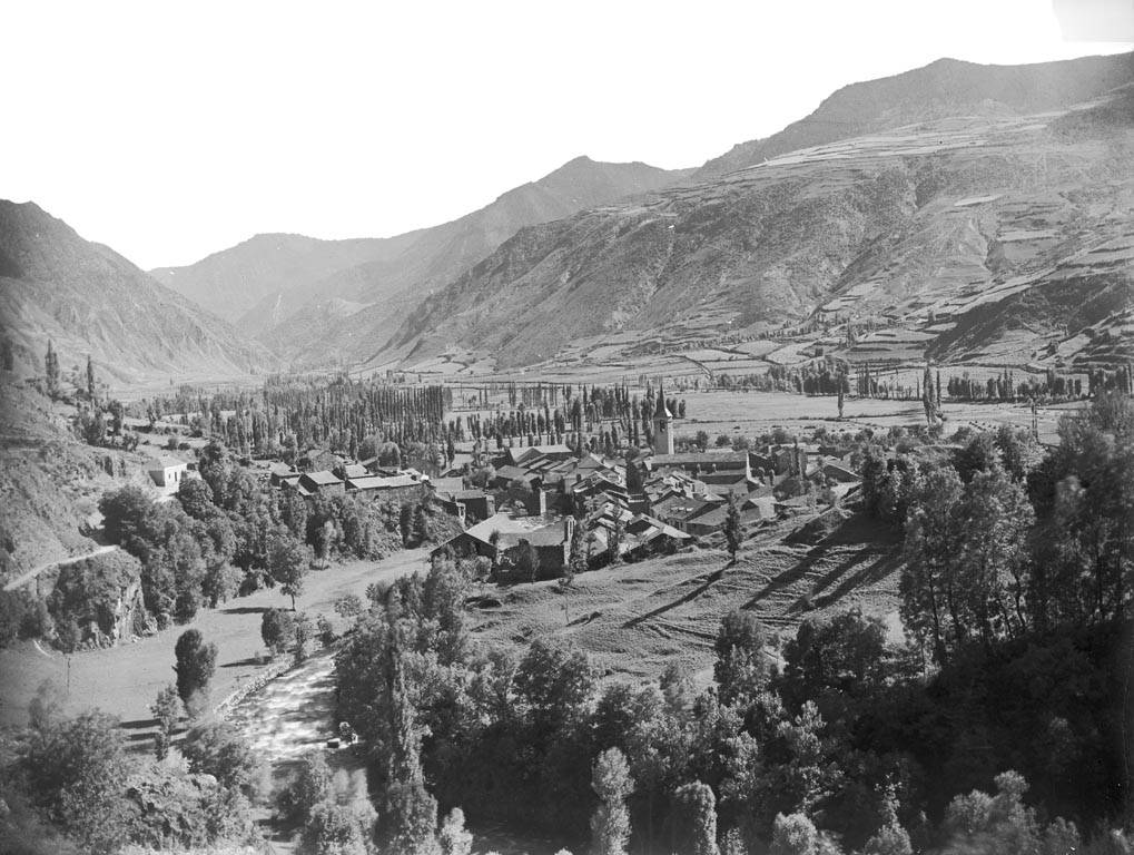 Imatge